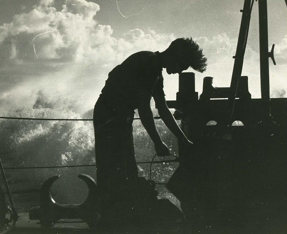 The picture is taken from a Norwegian merchant ship in the convoy to Murmansk in the autumn of 1943. In rough weather, and with an always imminent danger of attack, the deck boy is totally calm as he prepares a depth-bomb. Arkivreferanse: PA-1209 NTBs krigsarkiv Uf-118